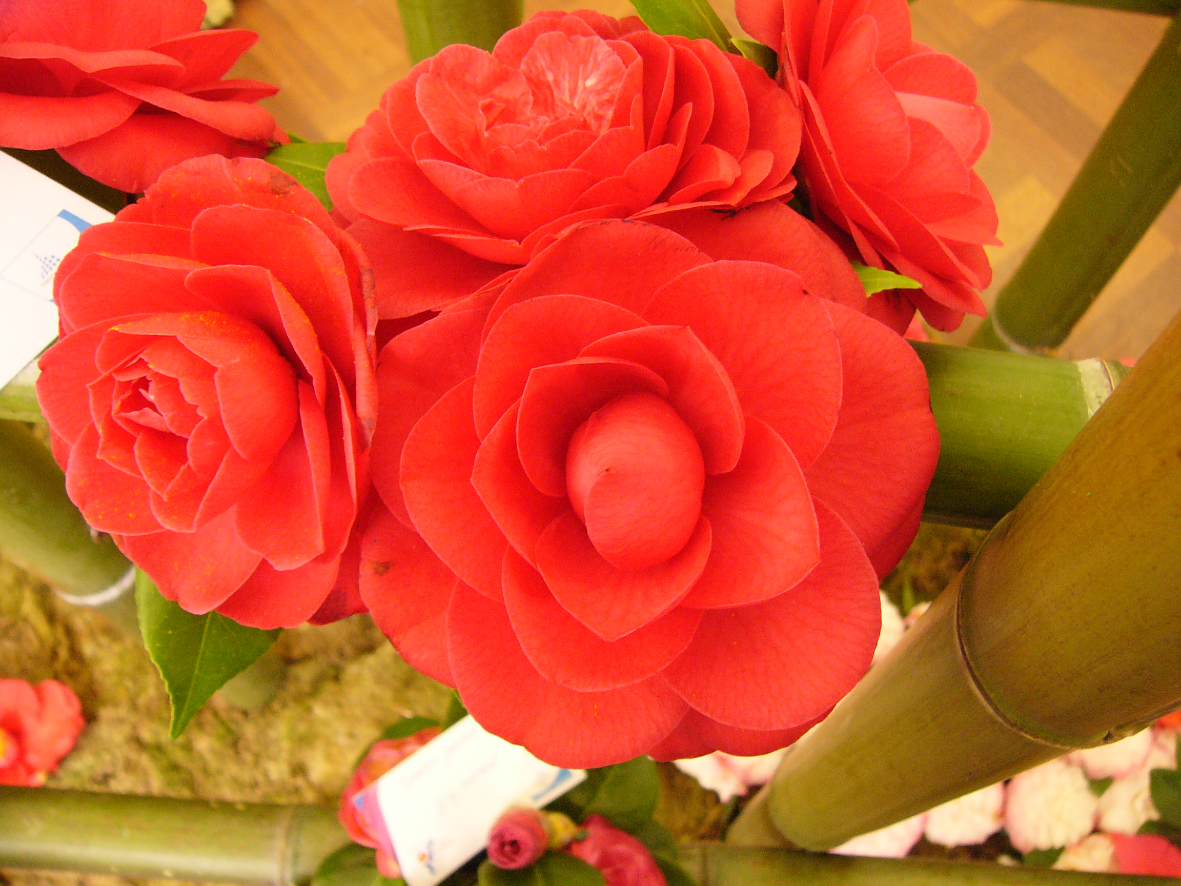 Camellia japonica 'Rubescens Major'